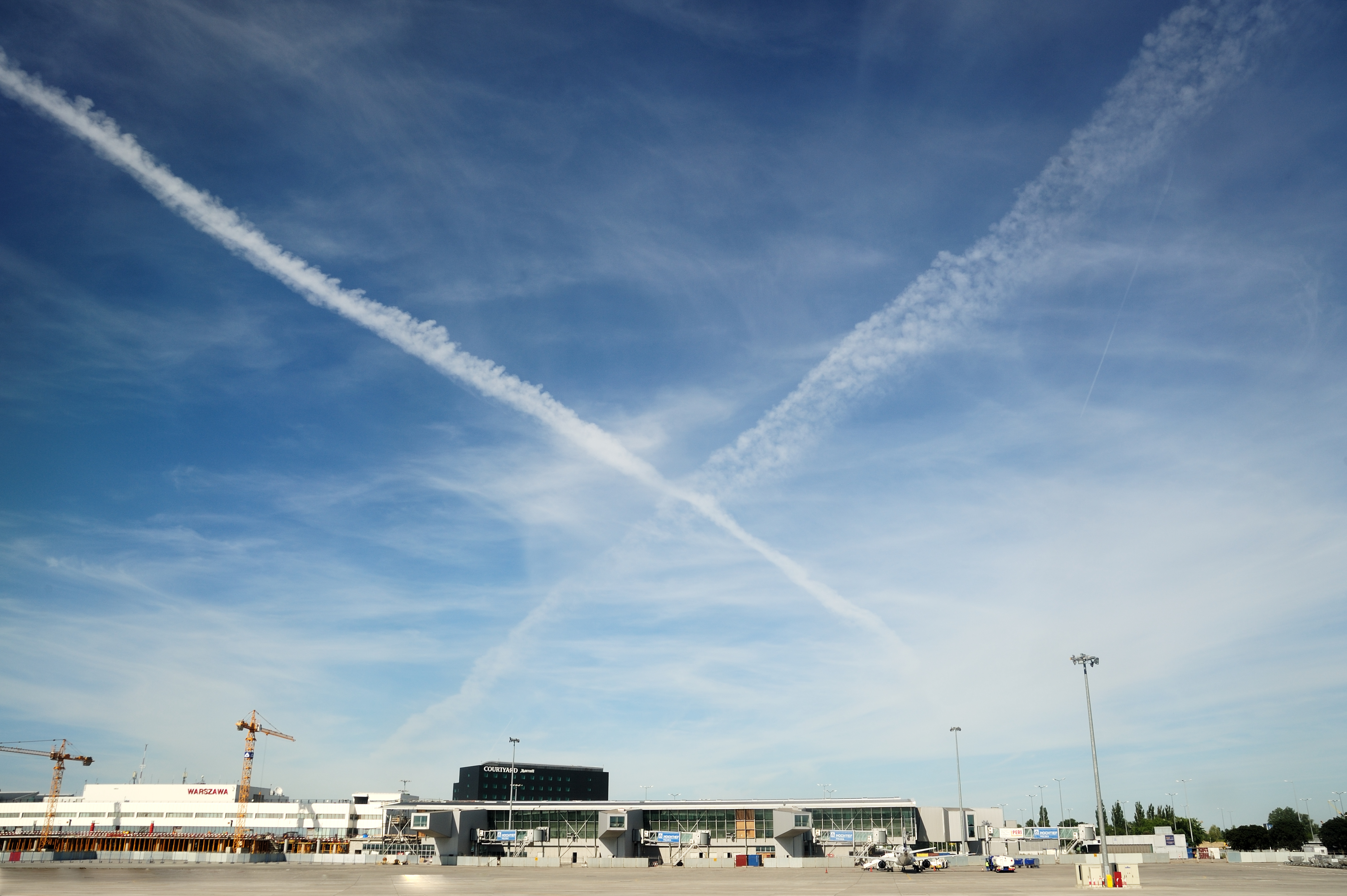 Bad Omen